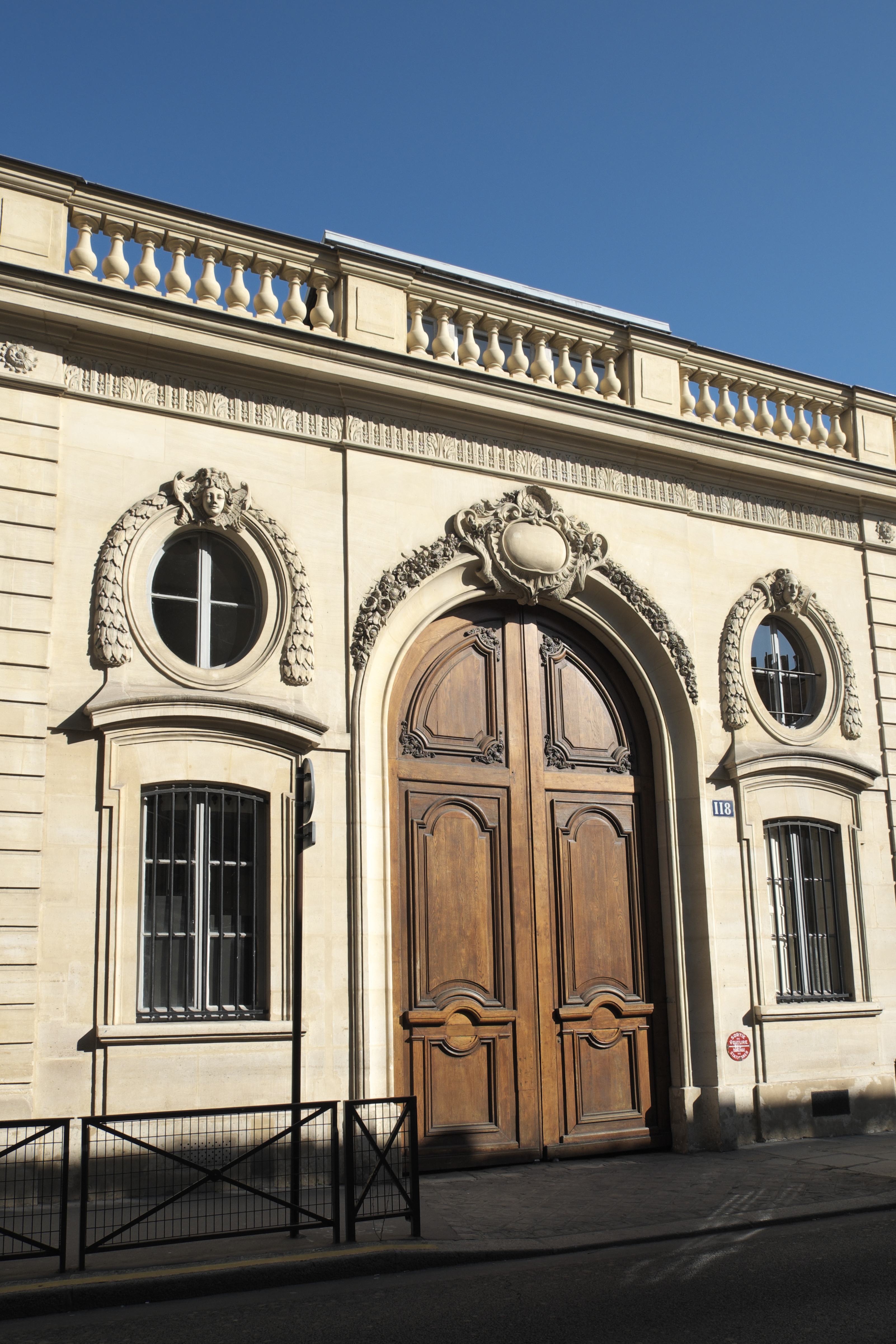 Petit Hôtel de Villars, Lycée Collège Privés Paul Claudel, in der Rue de Grenelle im 7. Arrondissement von Paris (Frankreich)